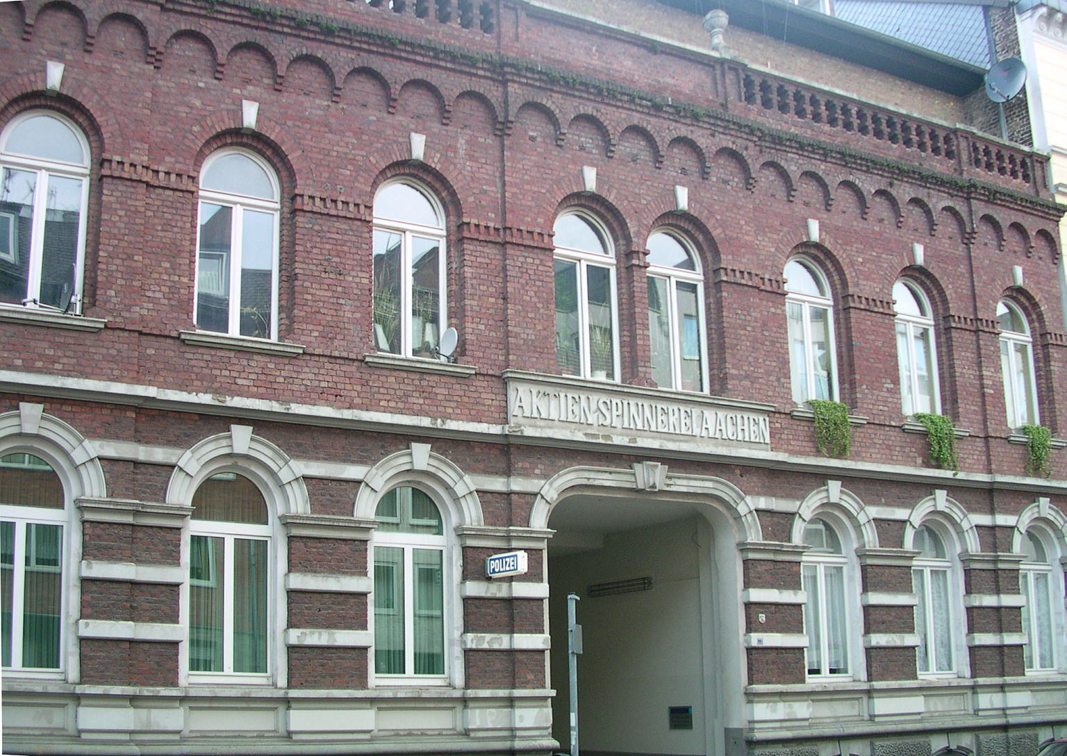 Aachen, Aachener Aktienspinnerei, 1889 von Hilden und Reuver gegründet, hier das Vorderhaus mit Büros (inzwischen von der Polizei genutzt) und Wohnungen (früher der Fabrikanten). Im Hinterhof war in den 1970/80er Jahren einer der ersten VOBIS-Läden.